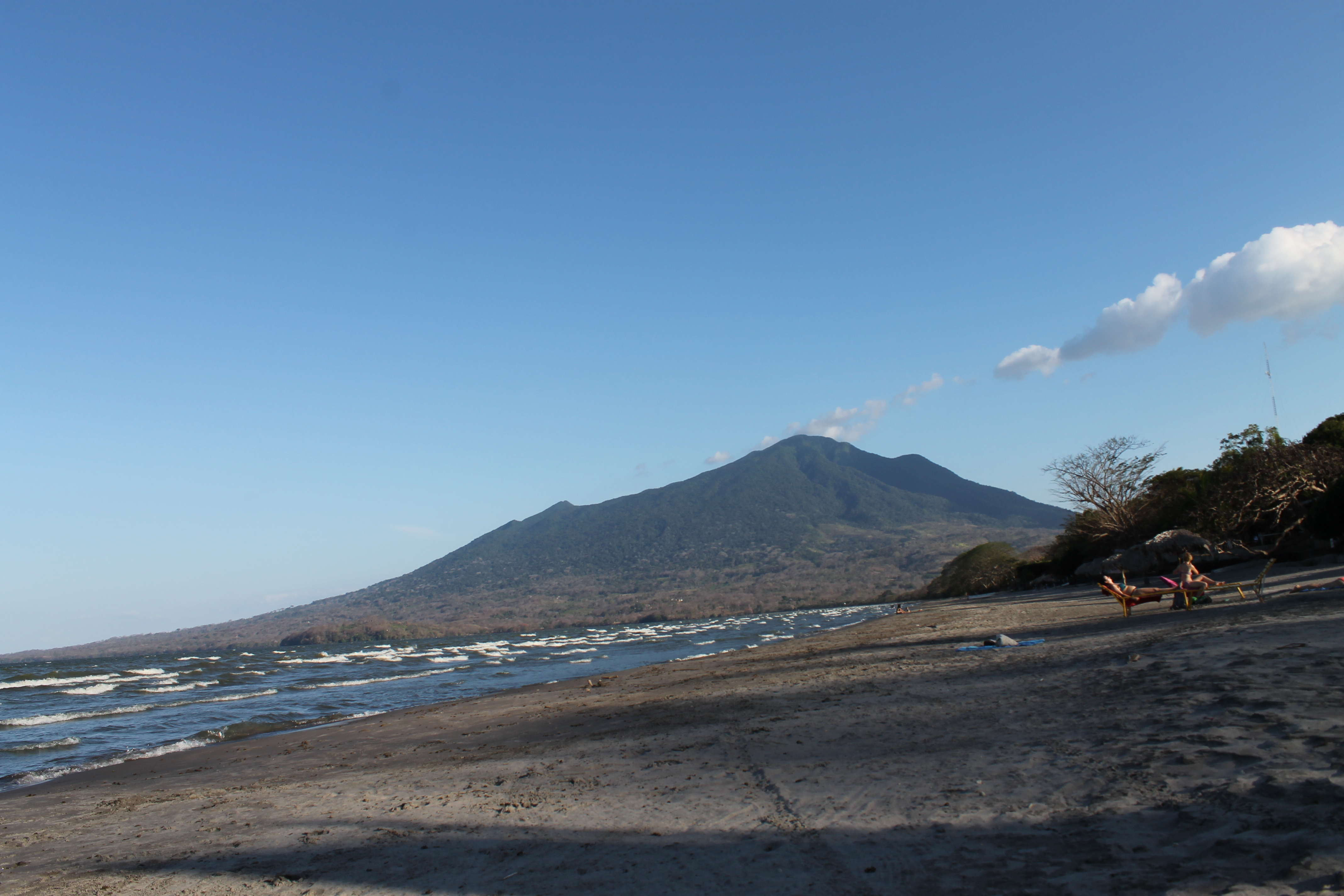 Volcan maderas Isla de Ometepe.